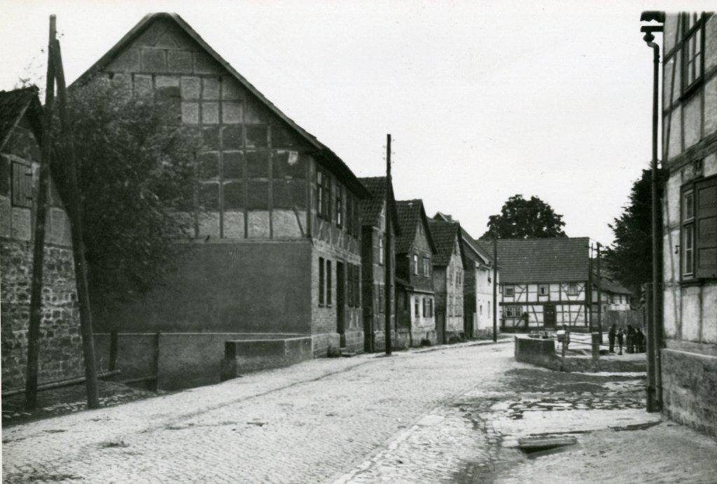 Dorfansicht Mitte Thalebra um 1935